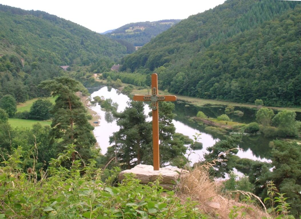 Vue sur la Truyère depuis Chaliers (15)